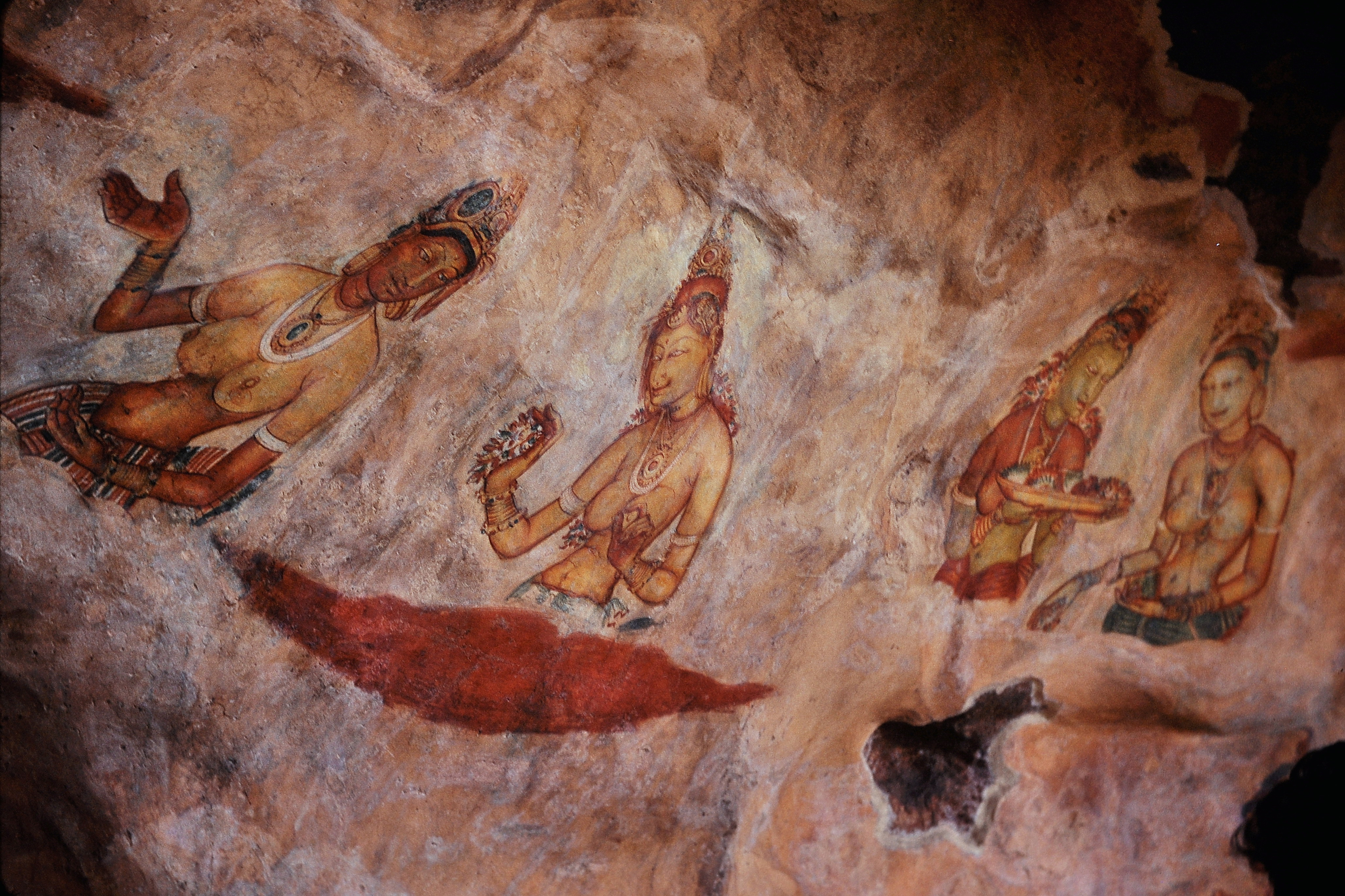 Wolkenmädchen in Sigiriya, Sri Lanka, aufgenommen 1970